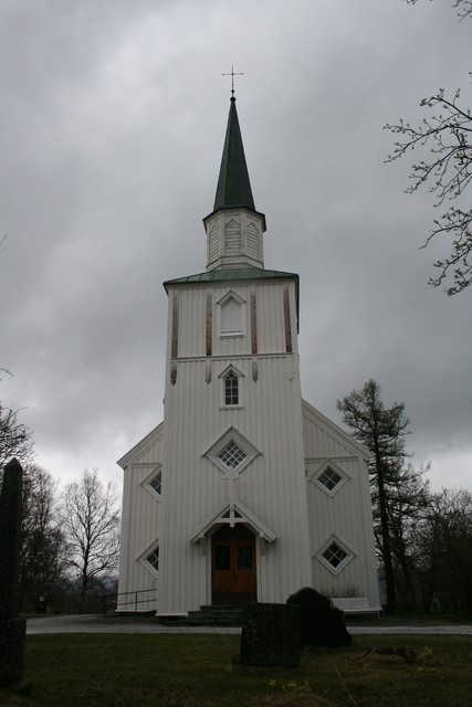 Fauske kyrkje en: Fauske church